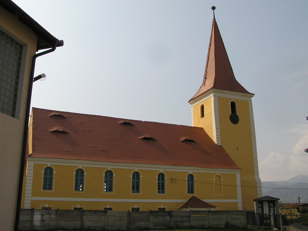 Evangelische Kirche von Tălmaciu (Talmesch), Siebenbürgen, Rumänien.